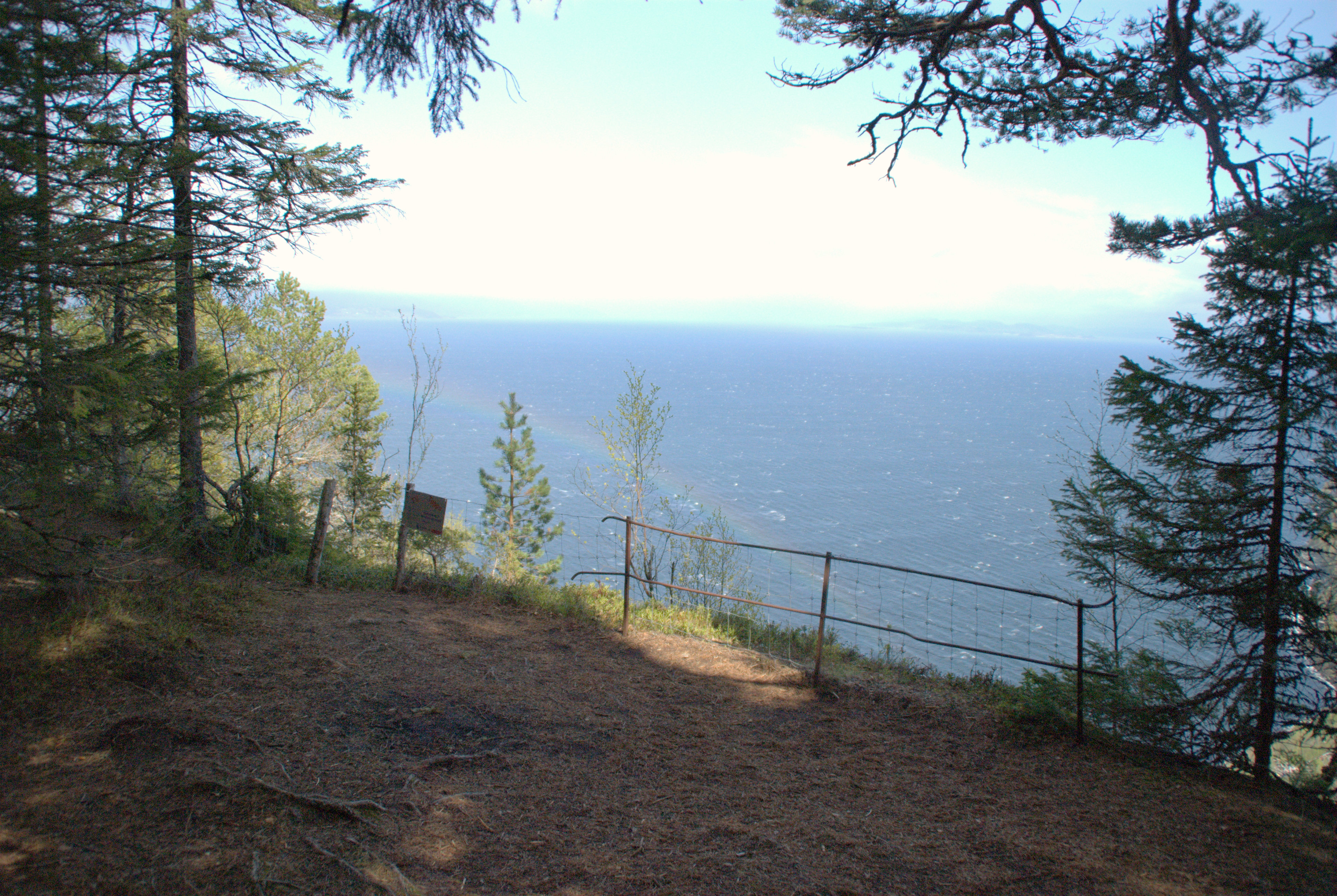 St. Olavsspranget i nordre del av Bymarka i Trondheim, Sør-Trøndelag.